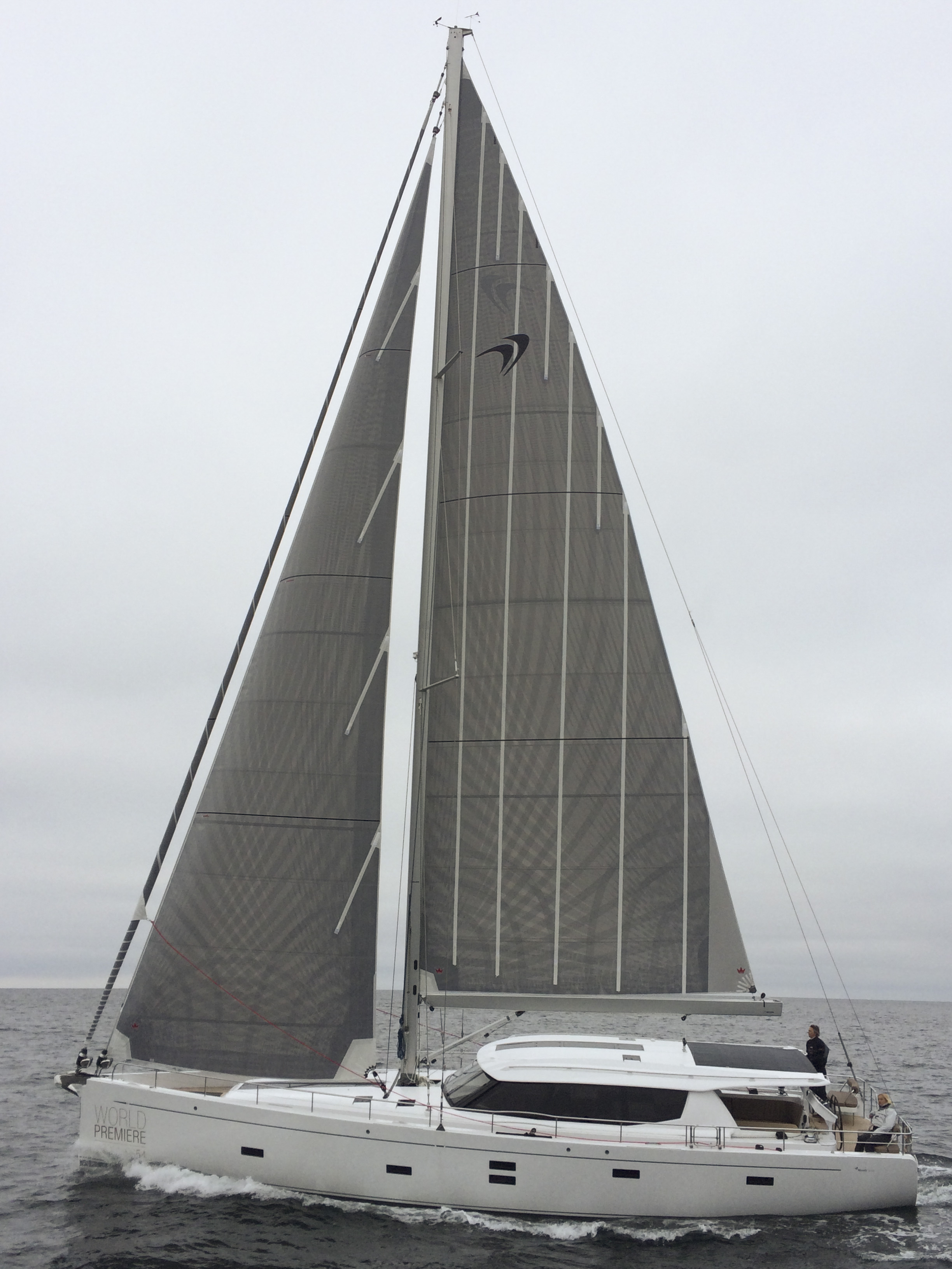 Moody DS 54 vor Rügen